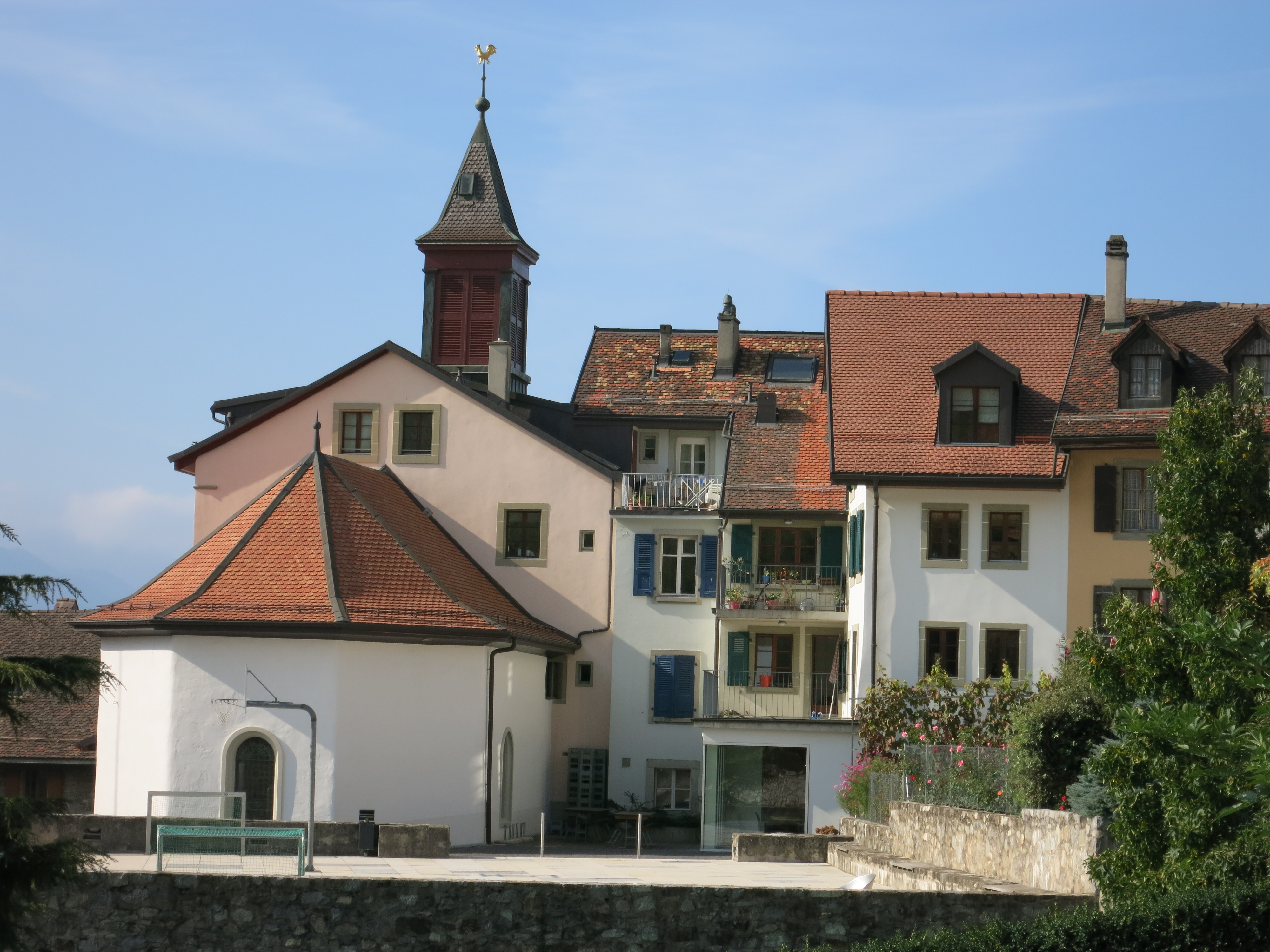 Rivaz VD, Schweiz